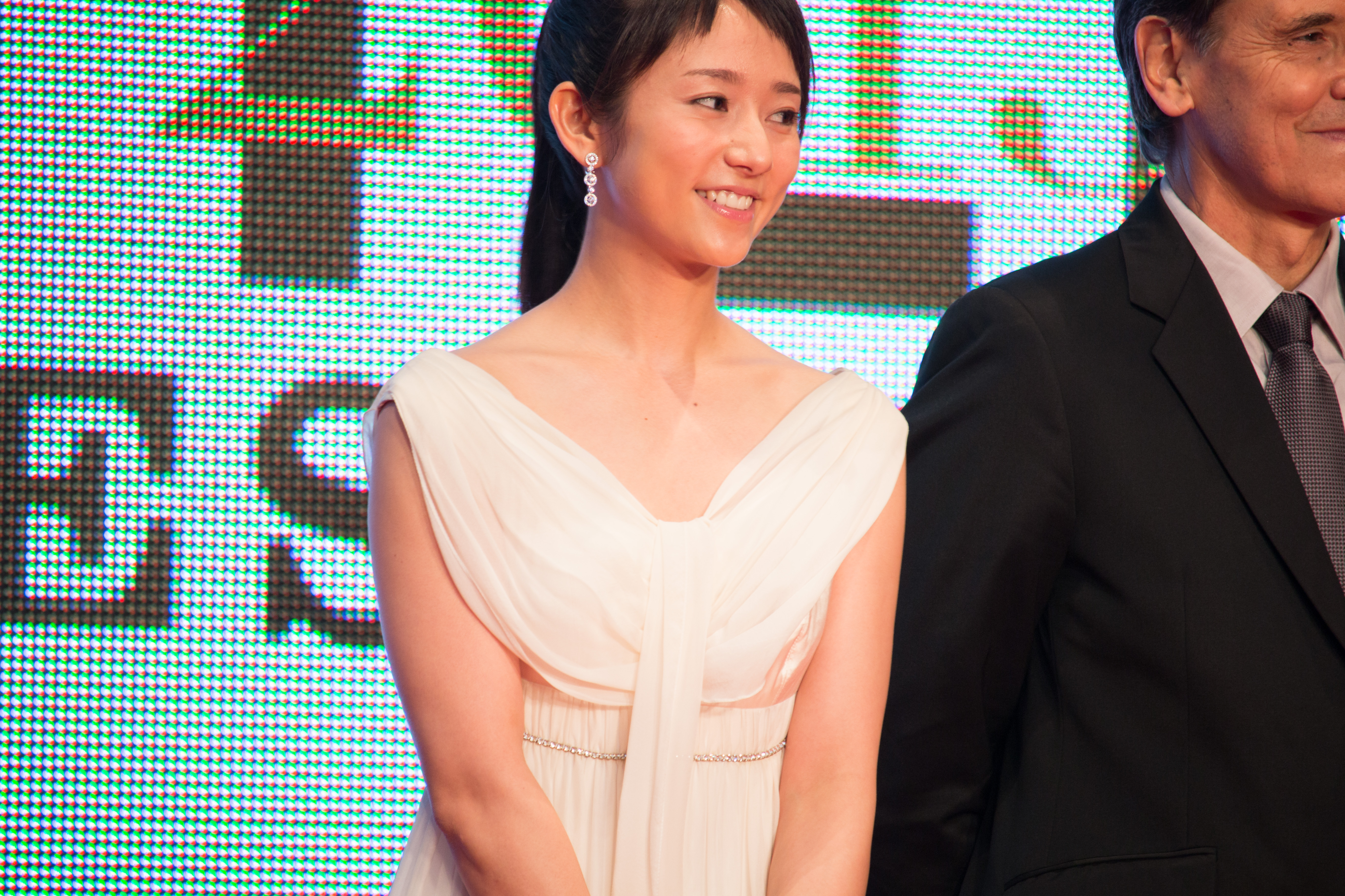 第28回 東京国際映画祭 オープニングセレモニー 木村文乃 (シーズンズ)